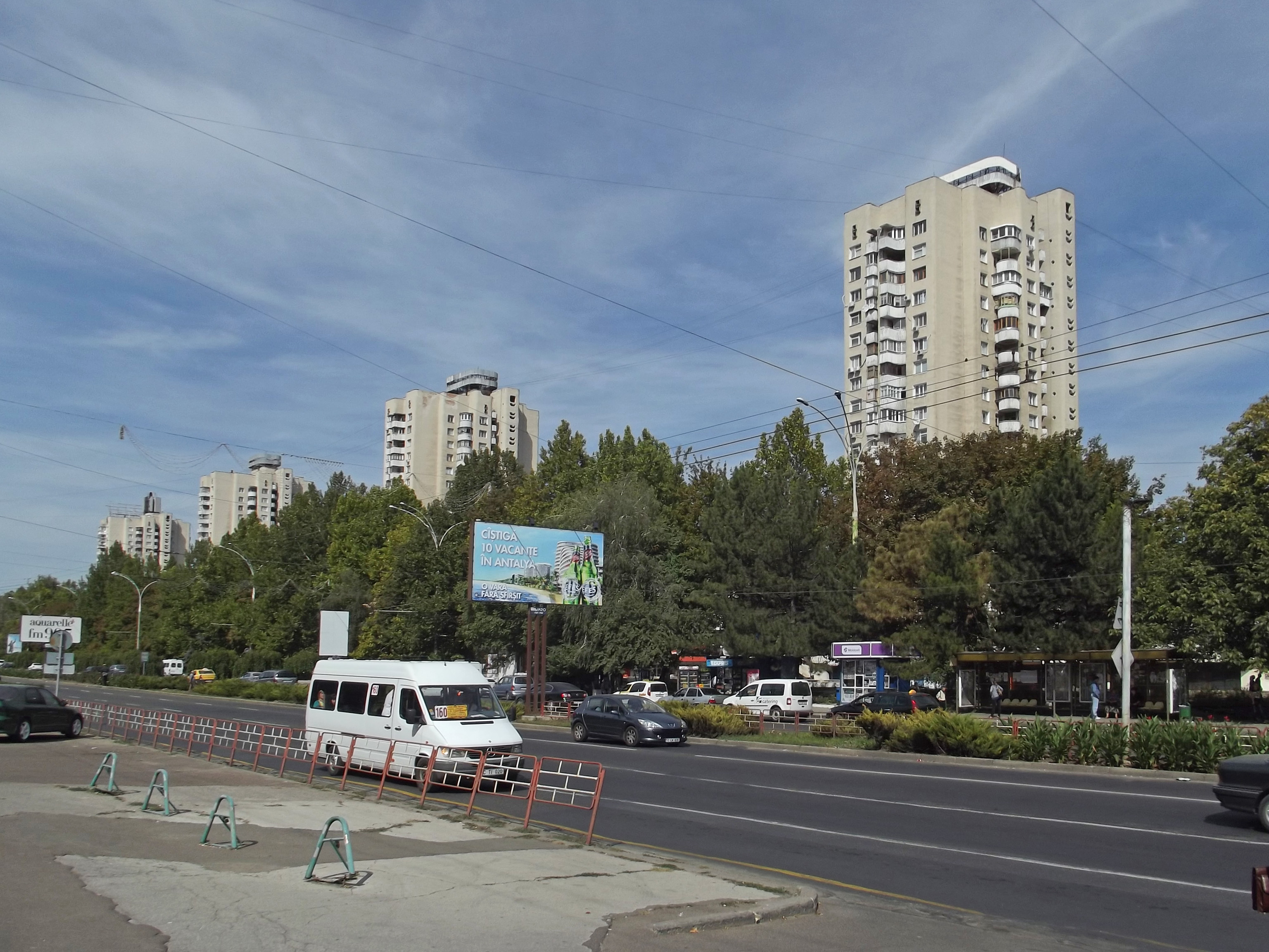 Проспект советского времени